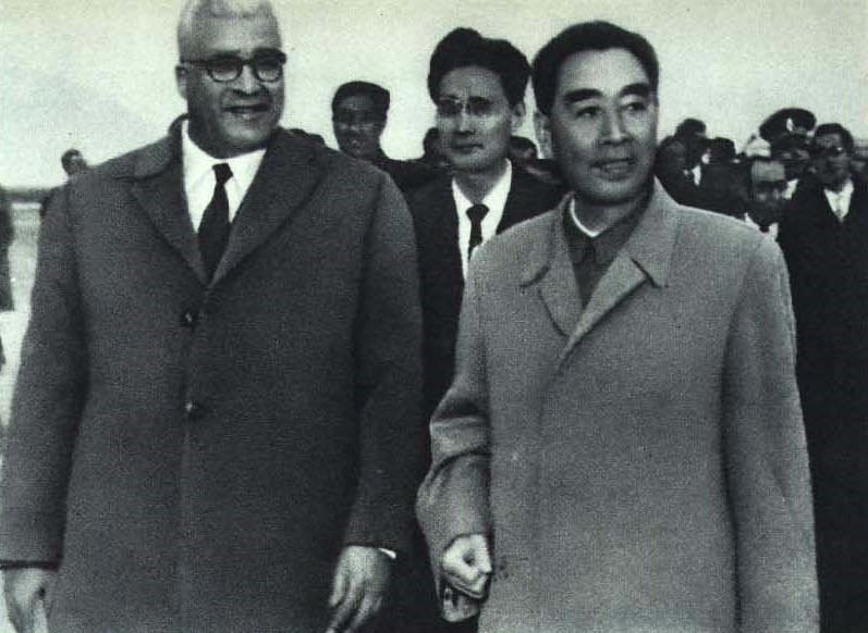 1964-03 1964年1月9日 周恩来总理访问突尼斯